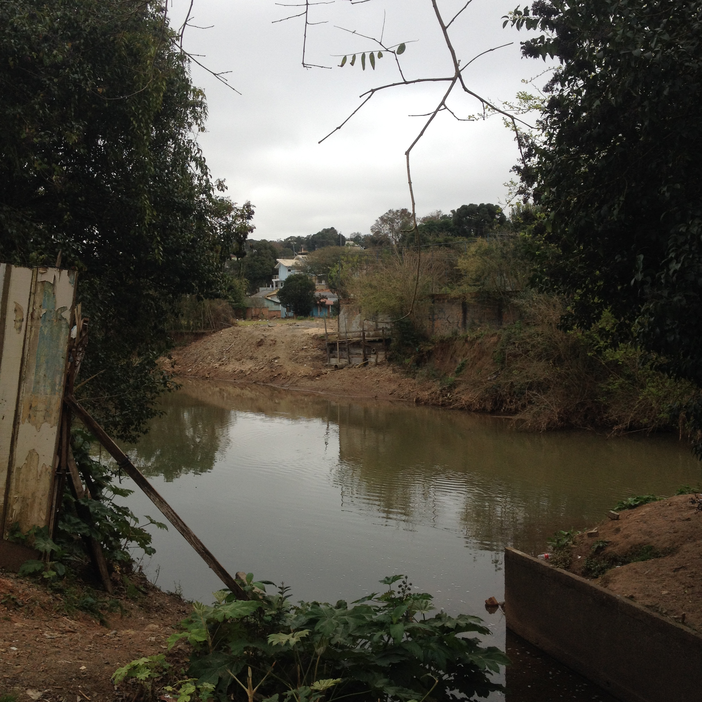 Margens do Rio Barigui totalmente desprotegidas e sendo alteradas sem qualquer cuidado com a erosão